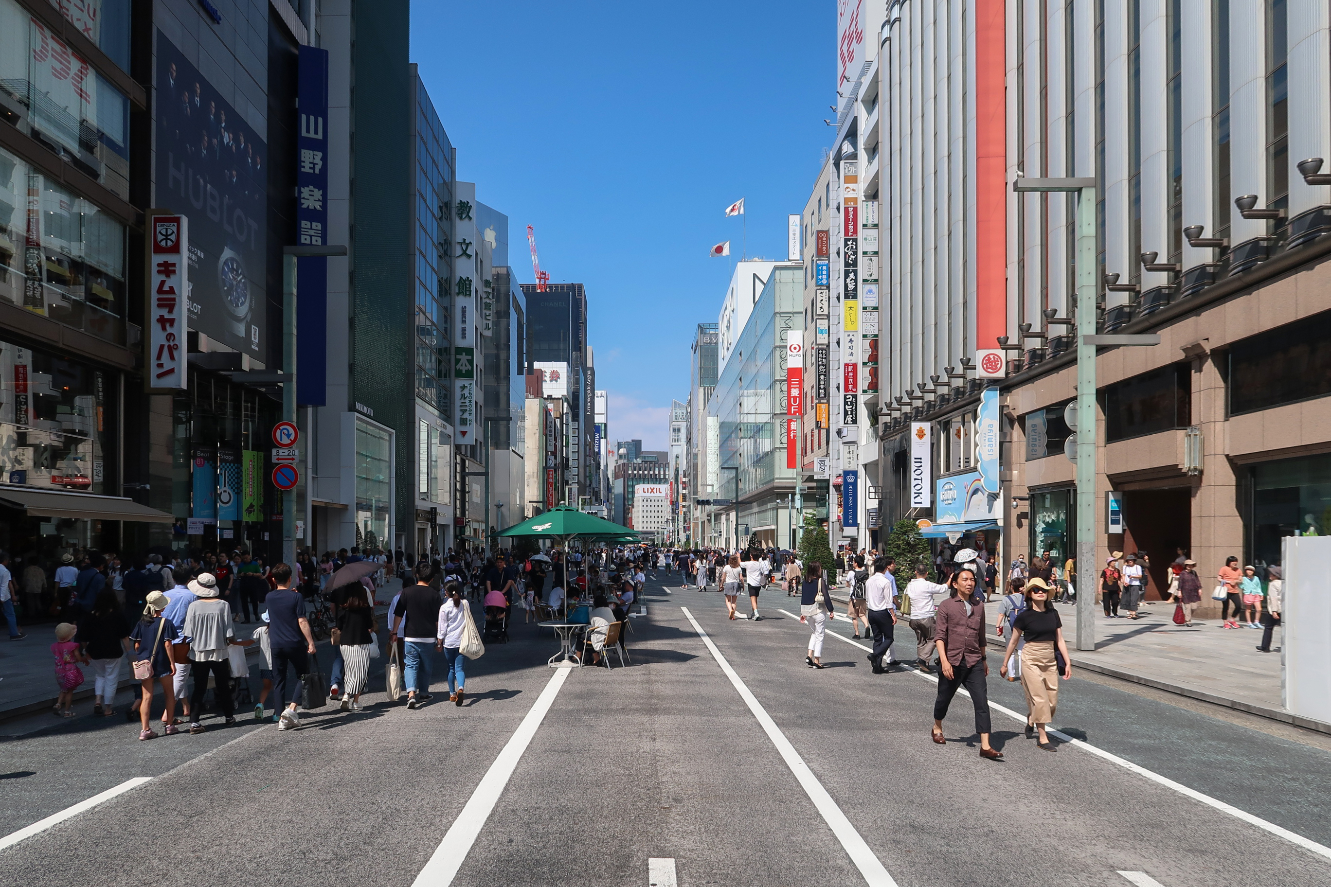 Car Free Ginza